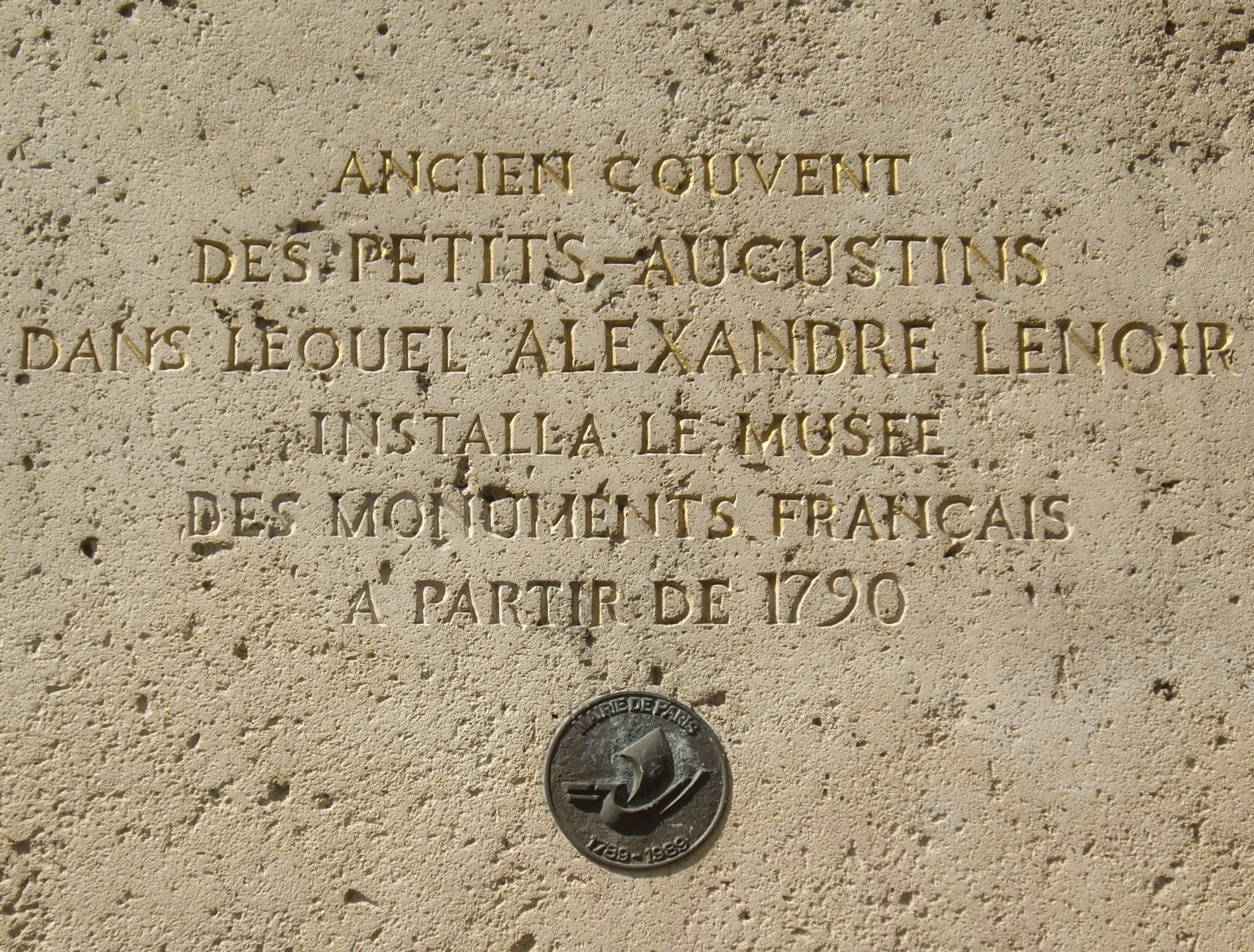 Inscription et plaque au n° 14 de la rue Bonaparte, Paris 6e. « Ancien couvent des Petits-Augustins dans lequel Alexandre Lenoir installa le Musée des monuments français à partir de 1790. »